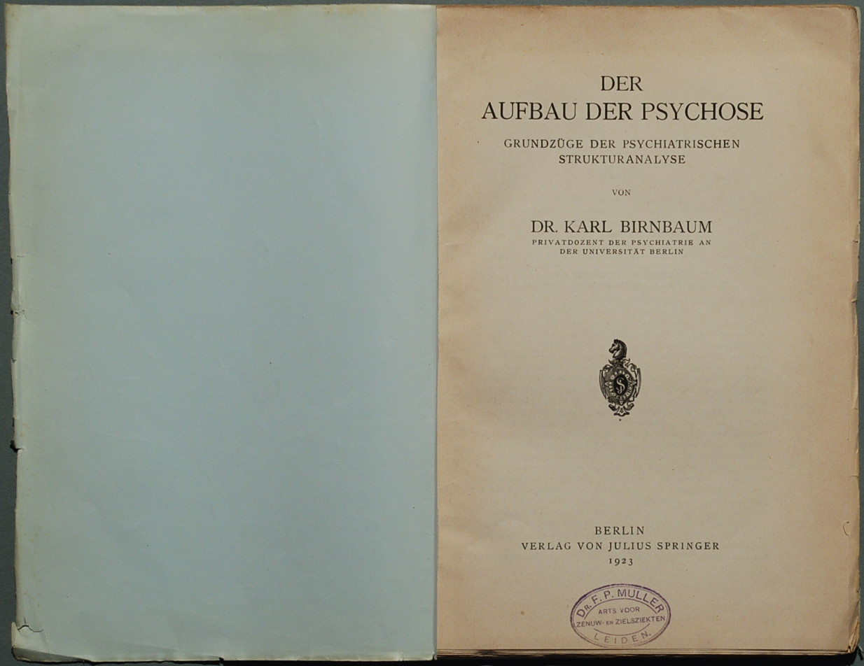 Birnbaum, Karl: Der Aufbau der Psychose. Berlin: J. Springer 1923